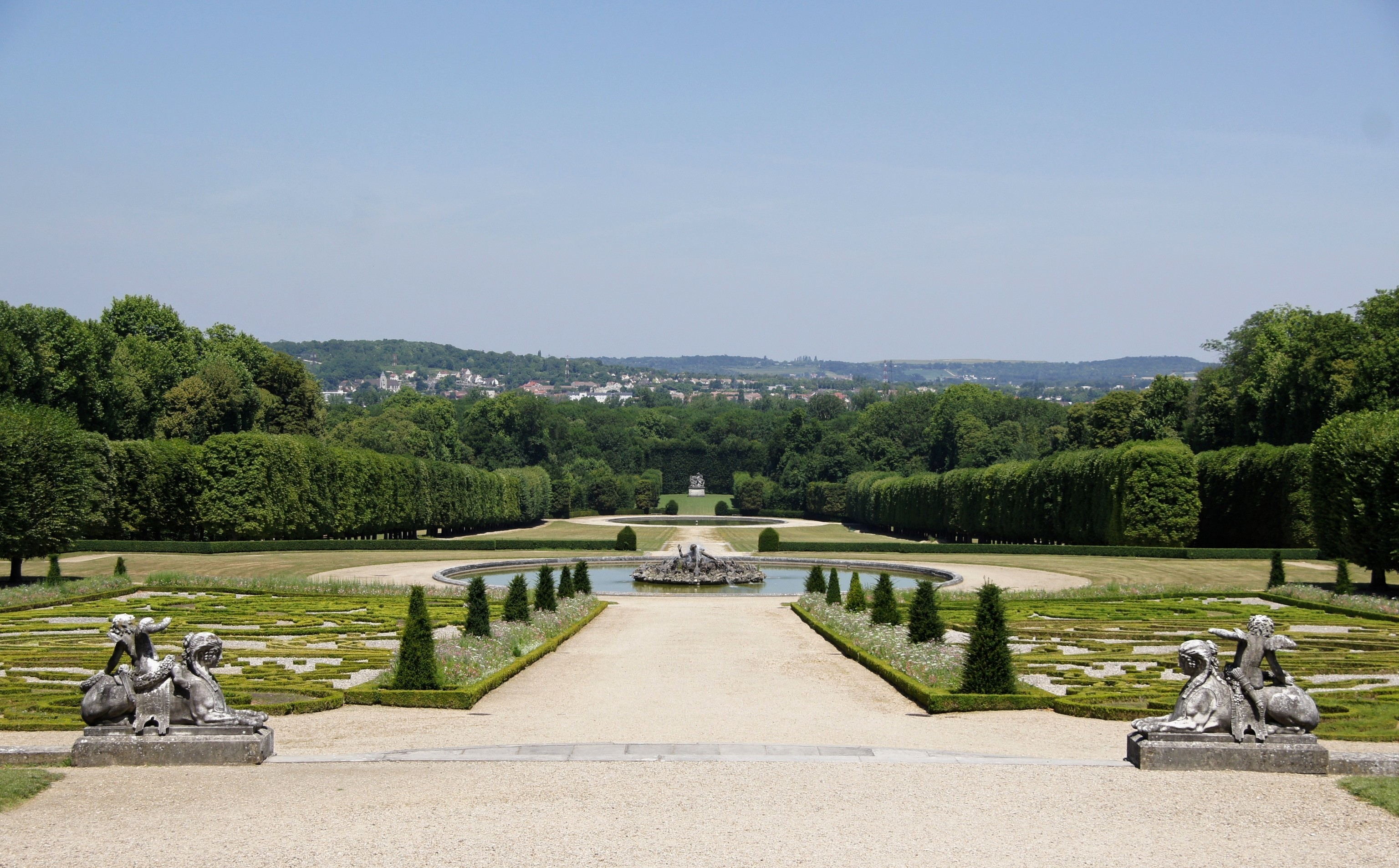 Vue du parc du Château de Champs Sur Marne.